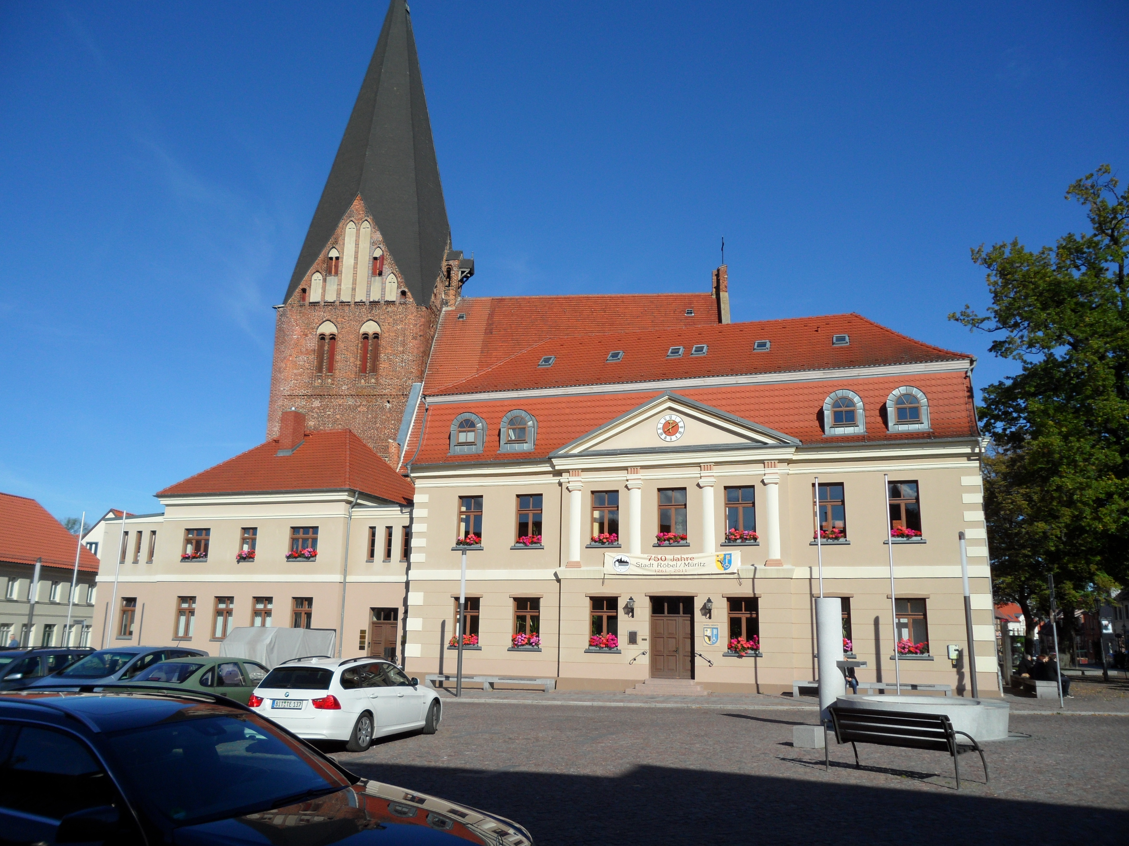 Rathaus Röbel, im Hintergrund die Nikolaikirche